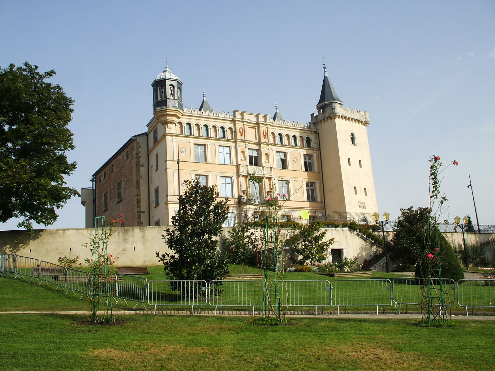 Vue de la face Ouest du château de Saint-Priest .